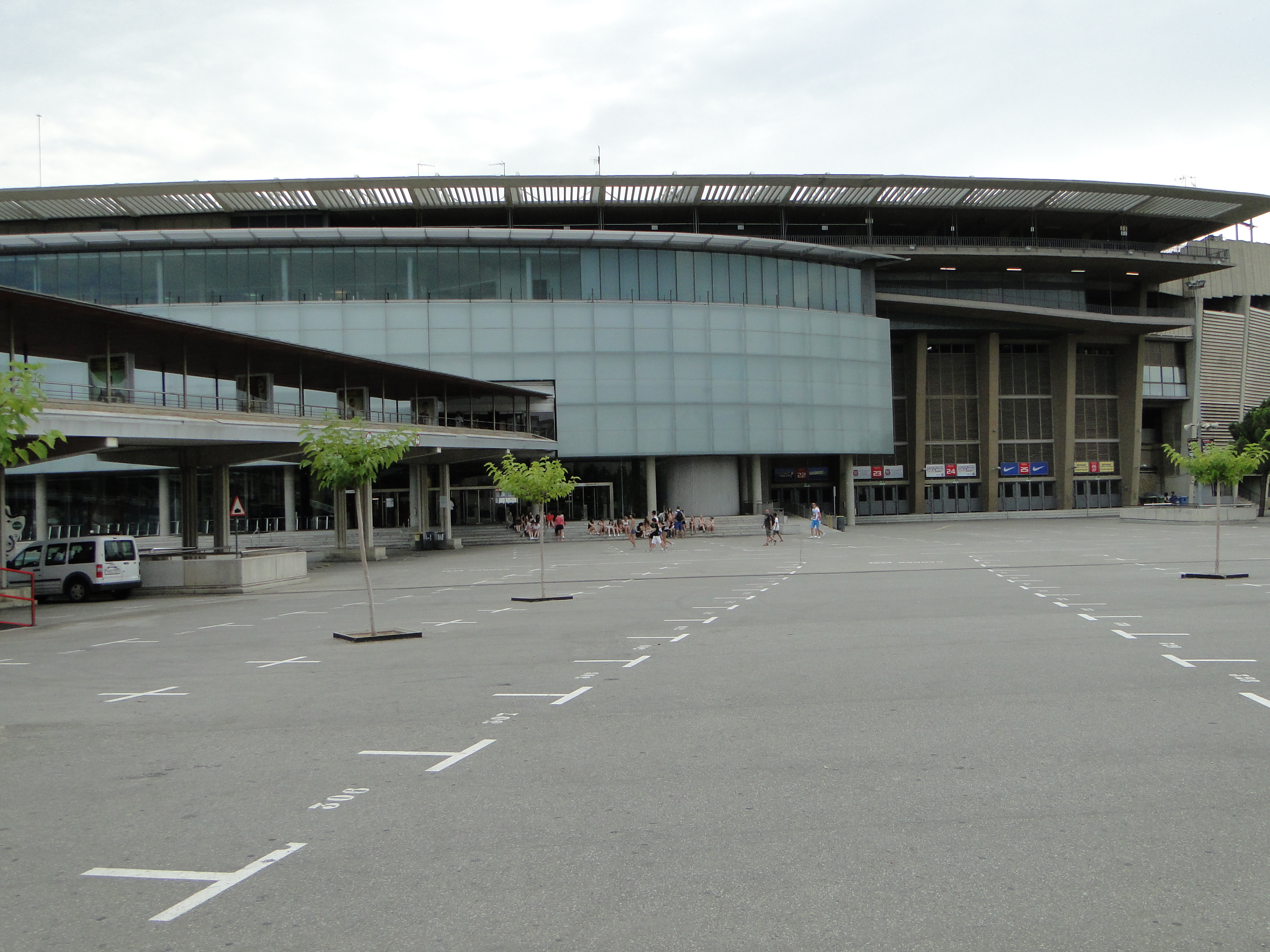 Barça